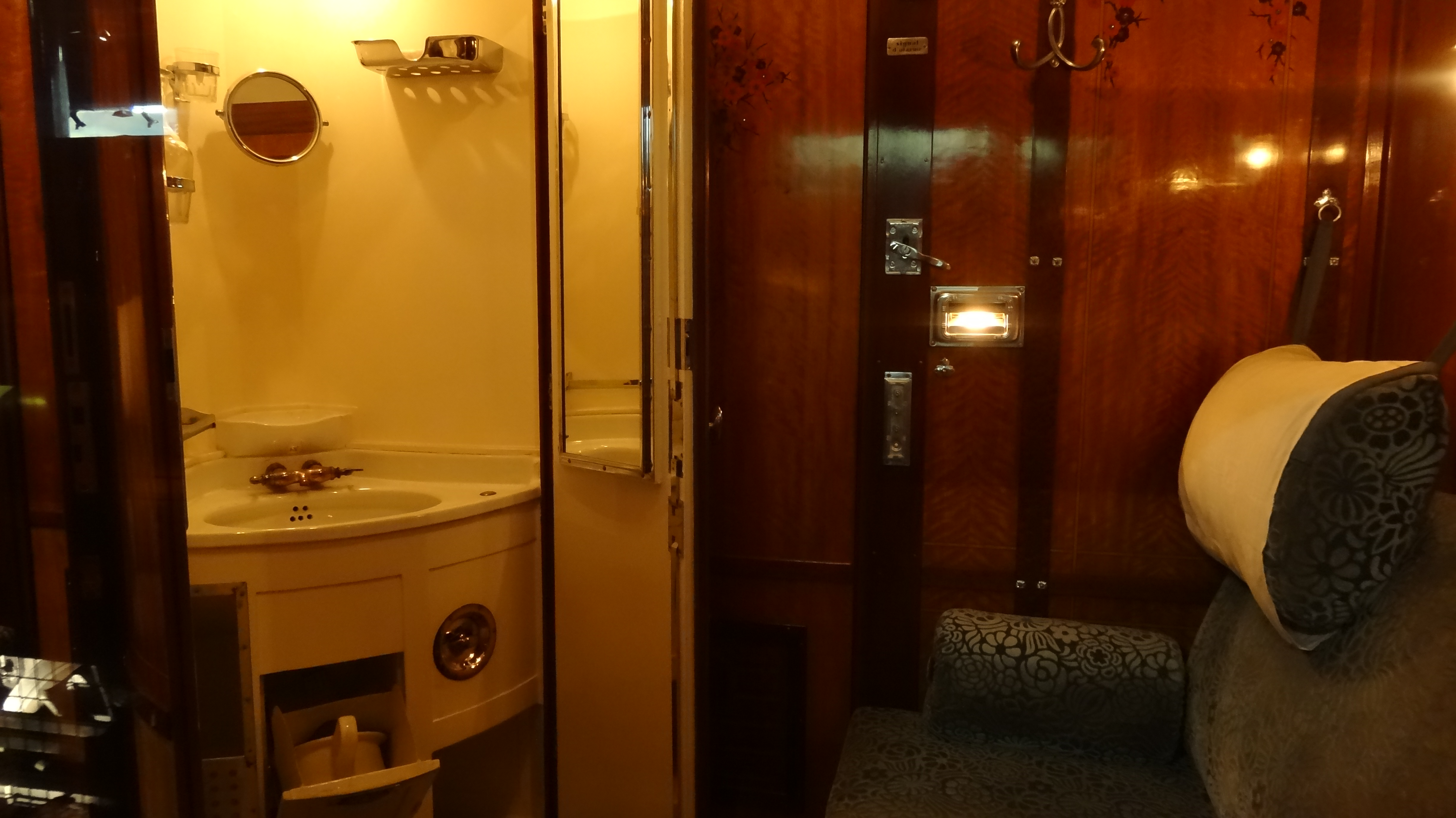 Intérieur d'un compartiment de la WL LX 3532 CIWL avec coin lavabo. Cité du train, Mulhouse.